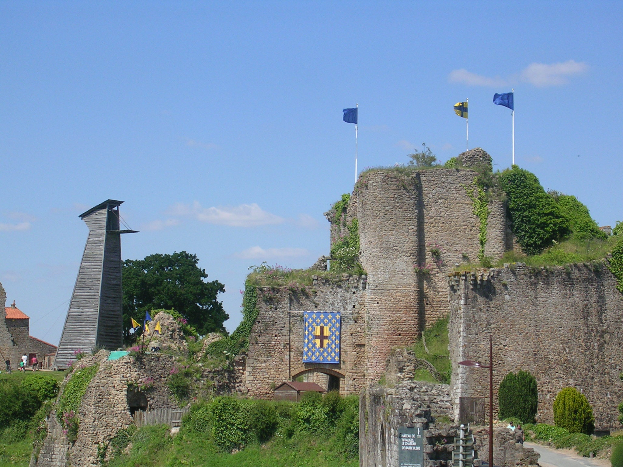 Entrée du château de Tiffauges, dans le département français de la Vendée